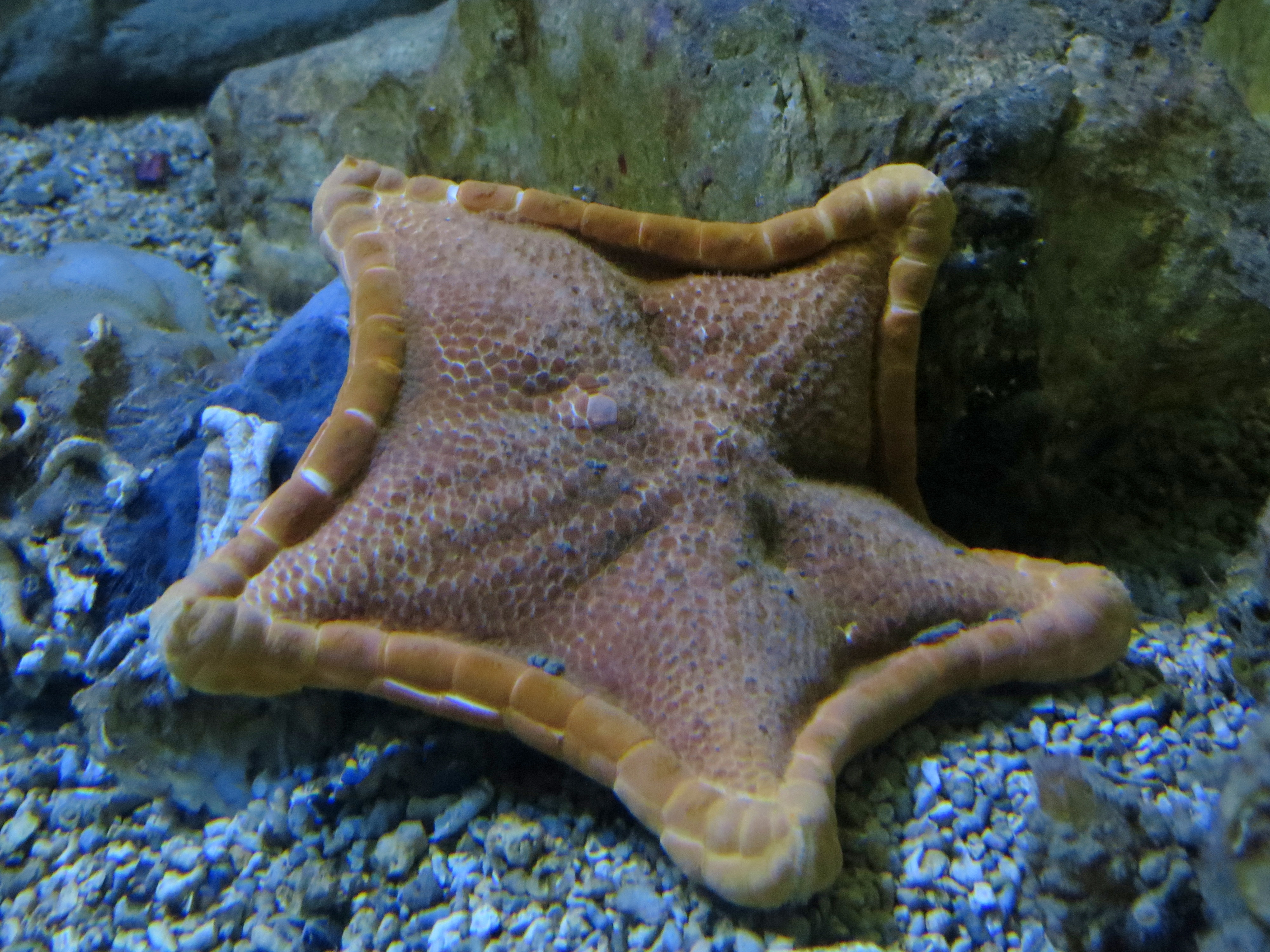 Une "étoile-biscuit" Peltaster placenta au Biodiversarium de l'Observatoire océanographique de Banyuls-sur-mer.